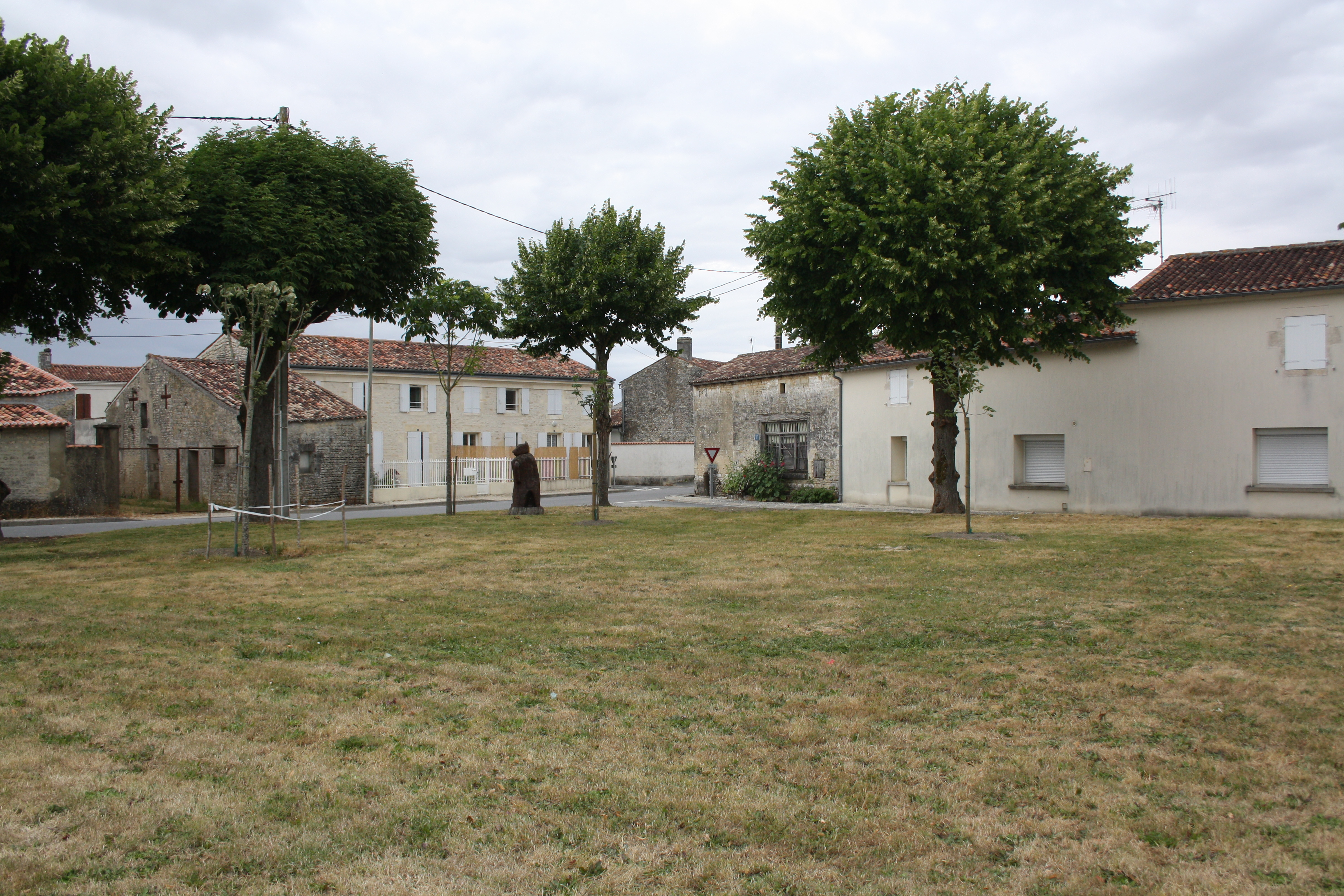 Place de Sainte-Même (Charente-Maritime, France).